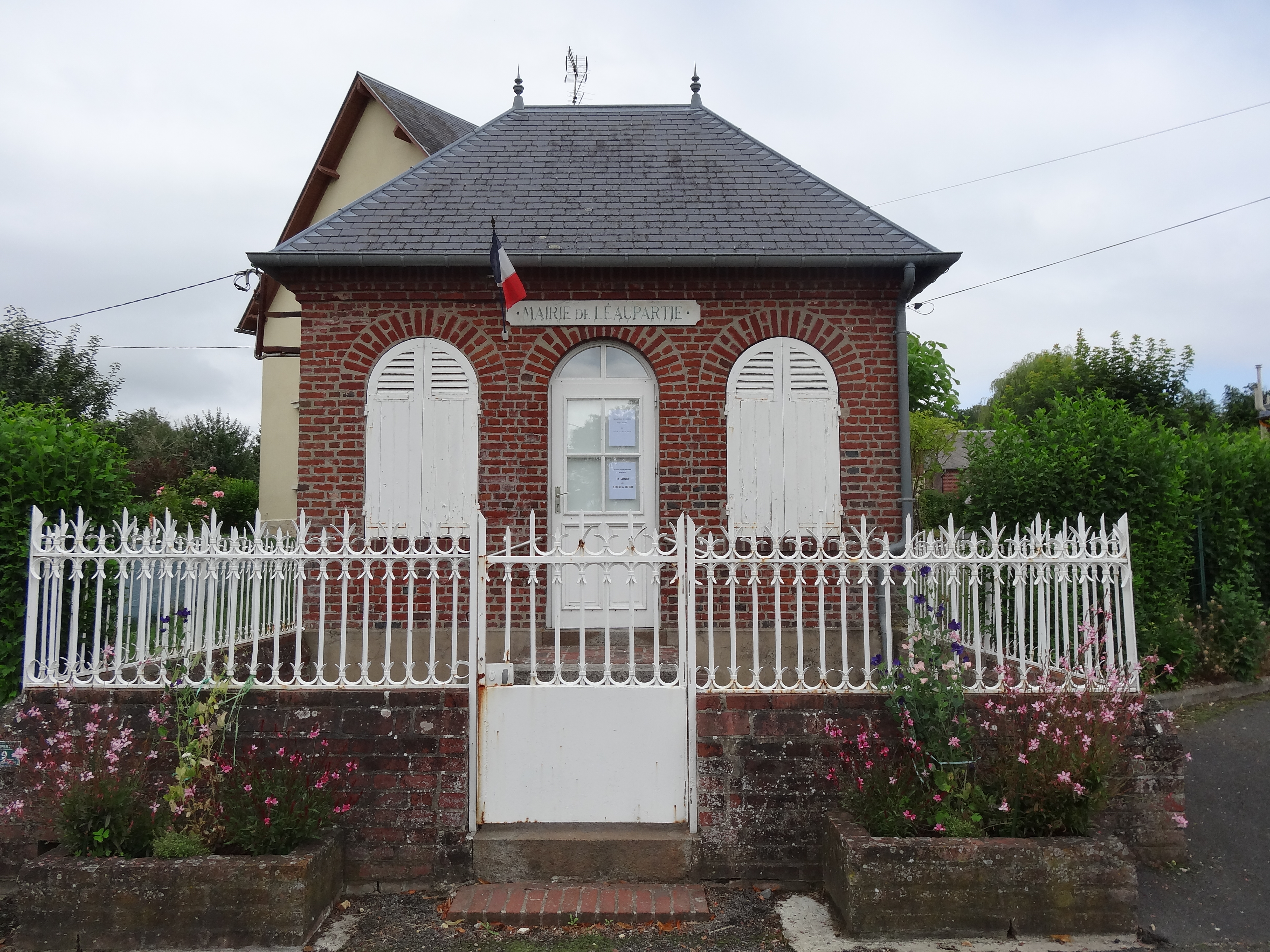 Mairie de Léaupartie dans le Calvados